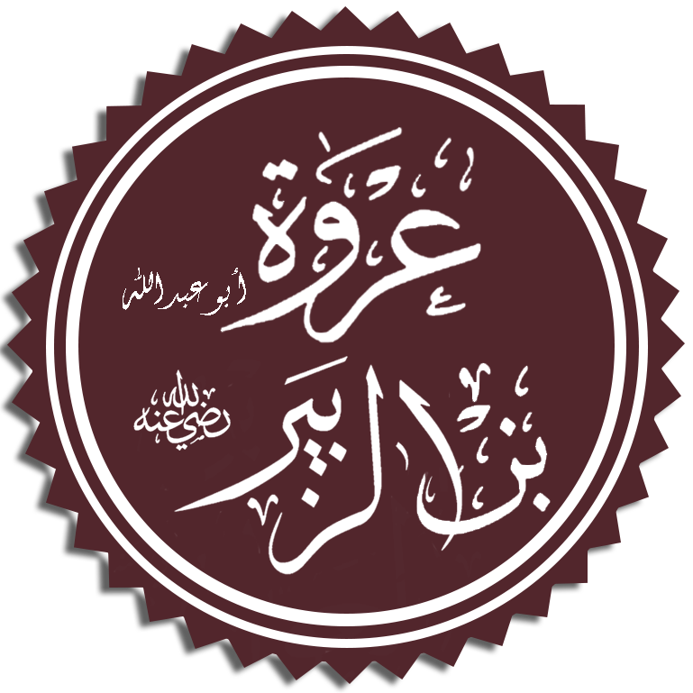 تخطيط اسم التابعي عروة بن الزبيرأبي عبد الله أحد فقهاء المدينة السبعة